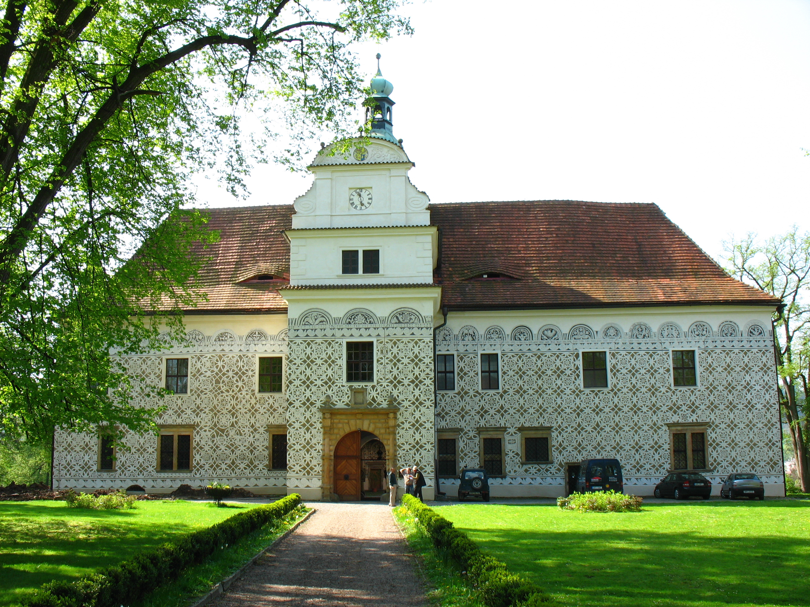 zámek Doudleby nad Orlicí